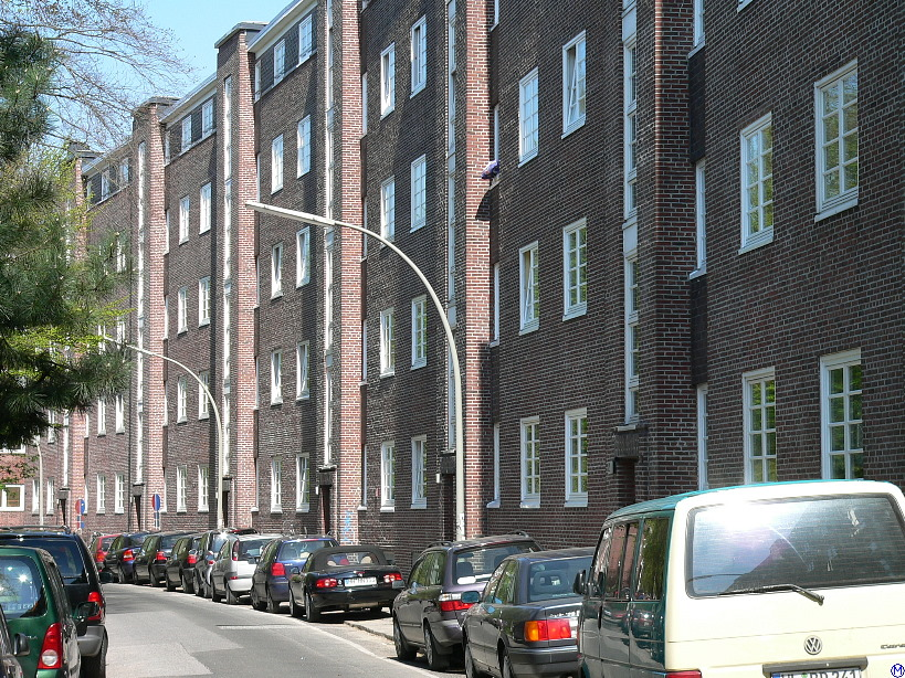 Jarrestadt, Hölderlinsallee in Hamburg (24.4.2005)